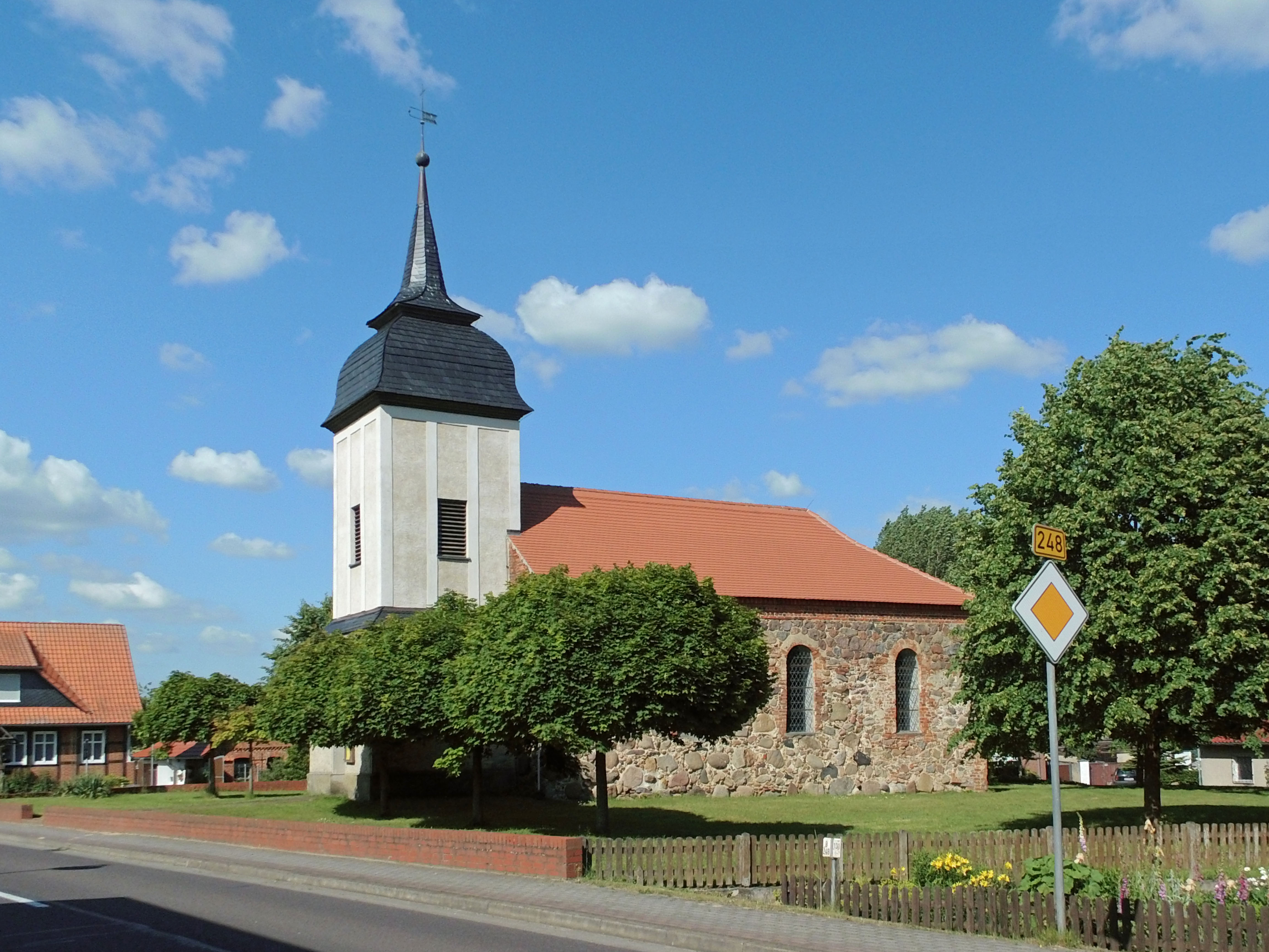 Evangelisch-lutherische Kirche in Mellin (Sachsen-Anhalt)